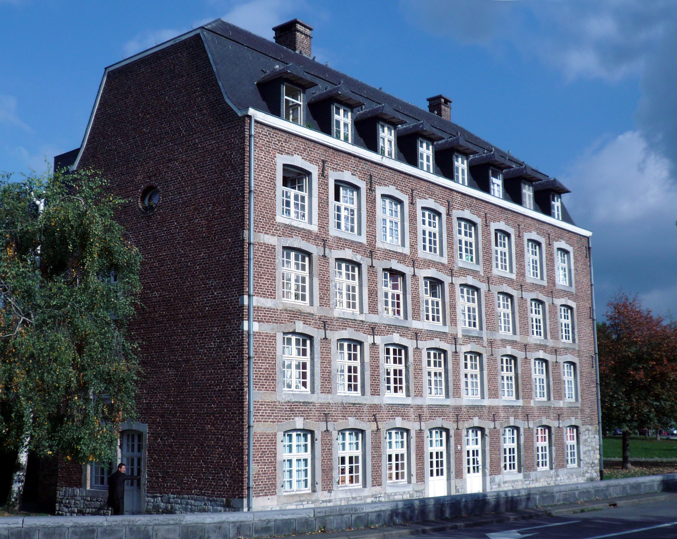 Tuchverlegergebäude Peltzer 1675, Maison Closset, Verviers